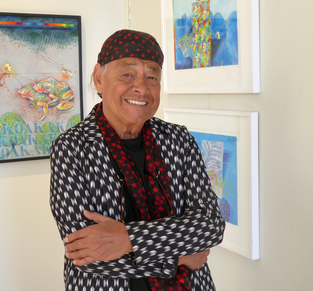 Ardy Strüwer vid sin utställning i Ystad 19 april 2019.